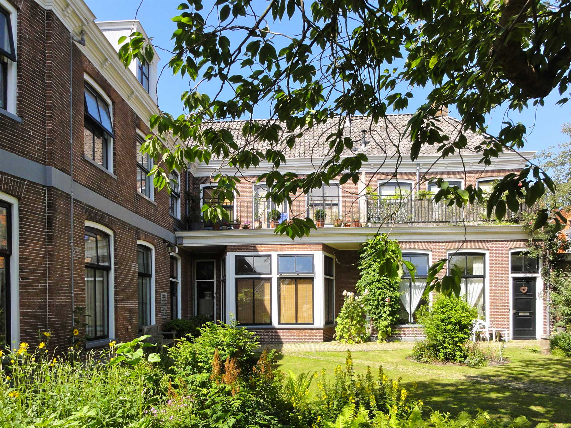 Binnenplaats van het voormalig Hervormd rusthuis of oudeliedenhuis aan het Kerkpad in Harlingen